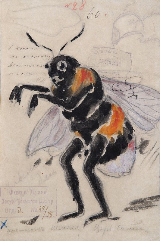 Эскиз костюма Шмеля к опере «Сказка о царе Салтане». 1913 г. Музей Большого театра